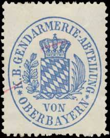 Sealing stamp Title: K.B. Gendarmerie-Abteilung von Oberbayern Description: blau, weiß Place: München size: 4x3 cm